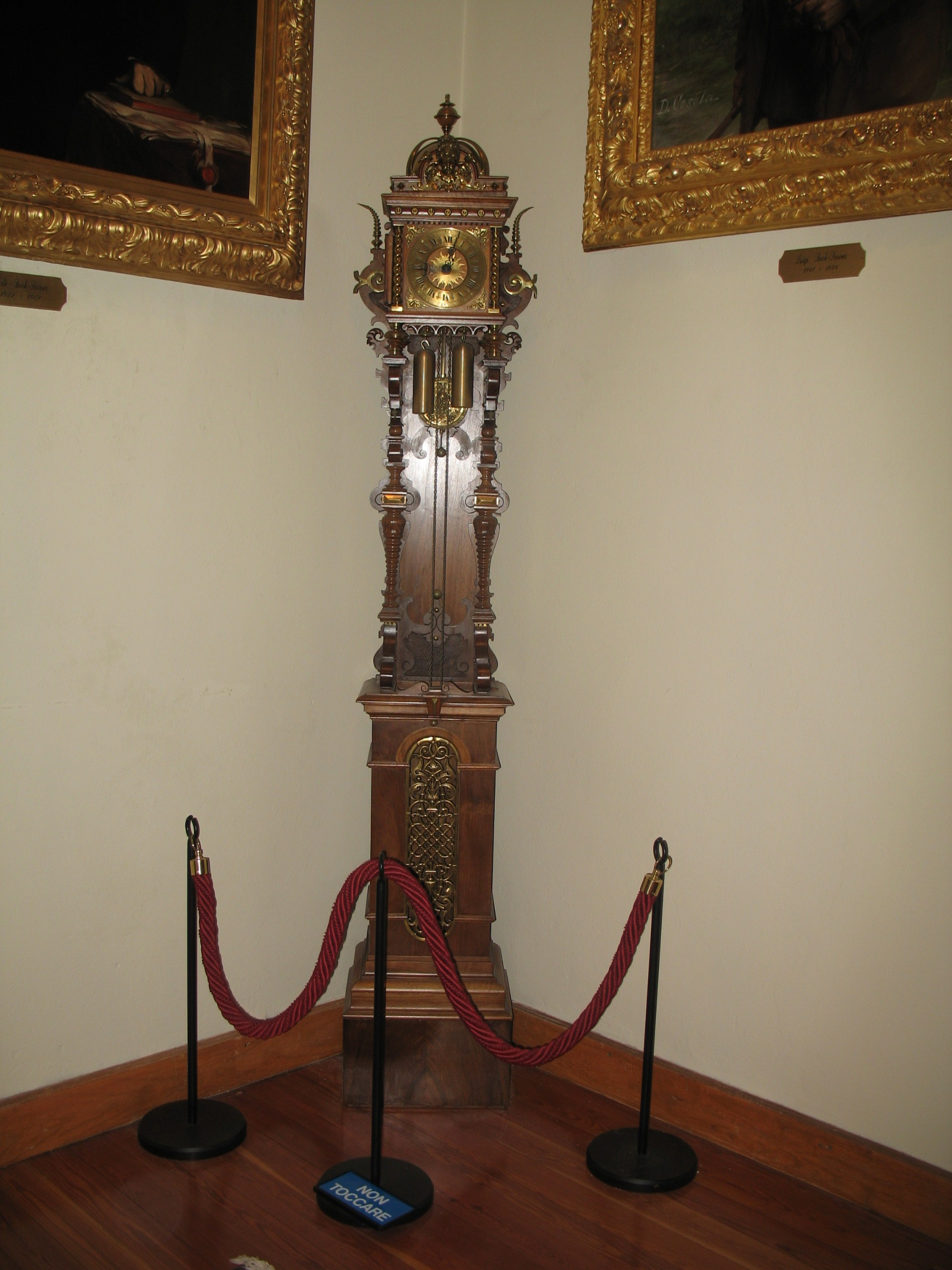 Immagine da Gressoney-Saint-Jean, Val d'Aosta - Museo Regionale della Fauna Alpina - Alpenfaunamuseum "Beck-Peccoz" - orologio a pendolo